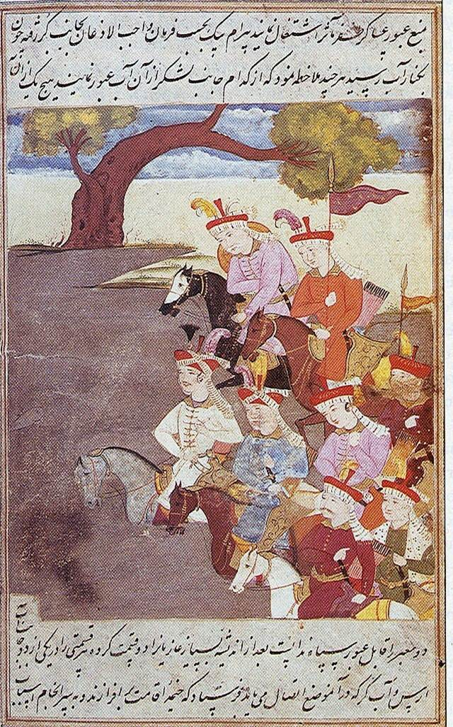 Şah İsmayıl və qızılbaşların Kür çayını keçməsi